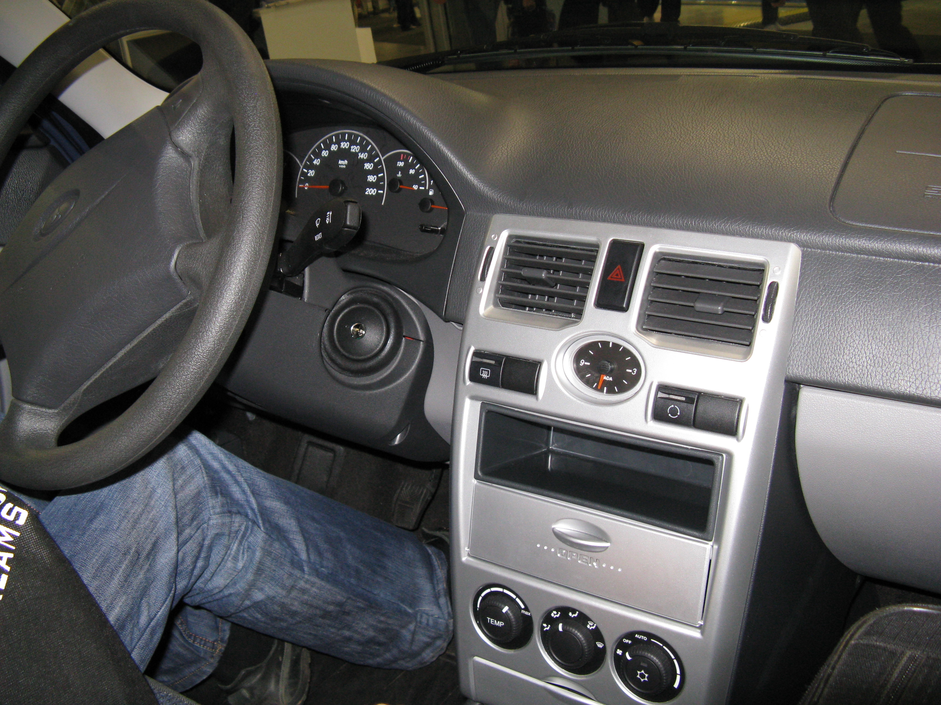 Вид передней части салона одного из автомобилей Лада Приора, показанных на ММАС-2008